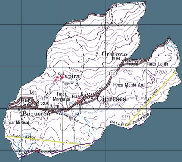 Cipreses